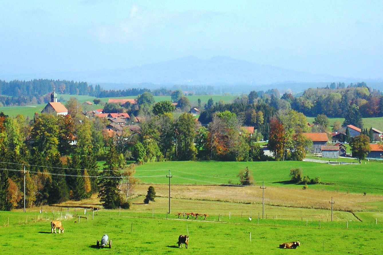 Rückholz bei Nesselwang im Allgäu, von Hollen aus gesehen. (Herbst 2007)